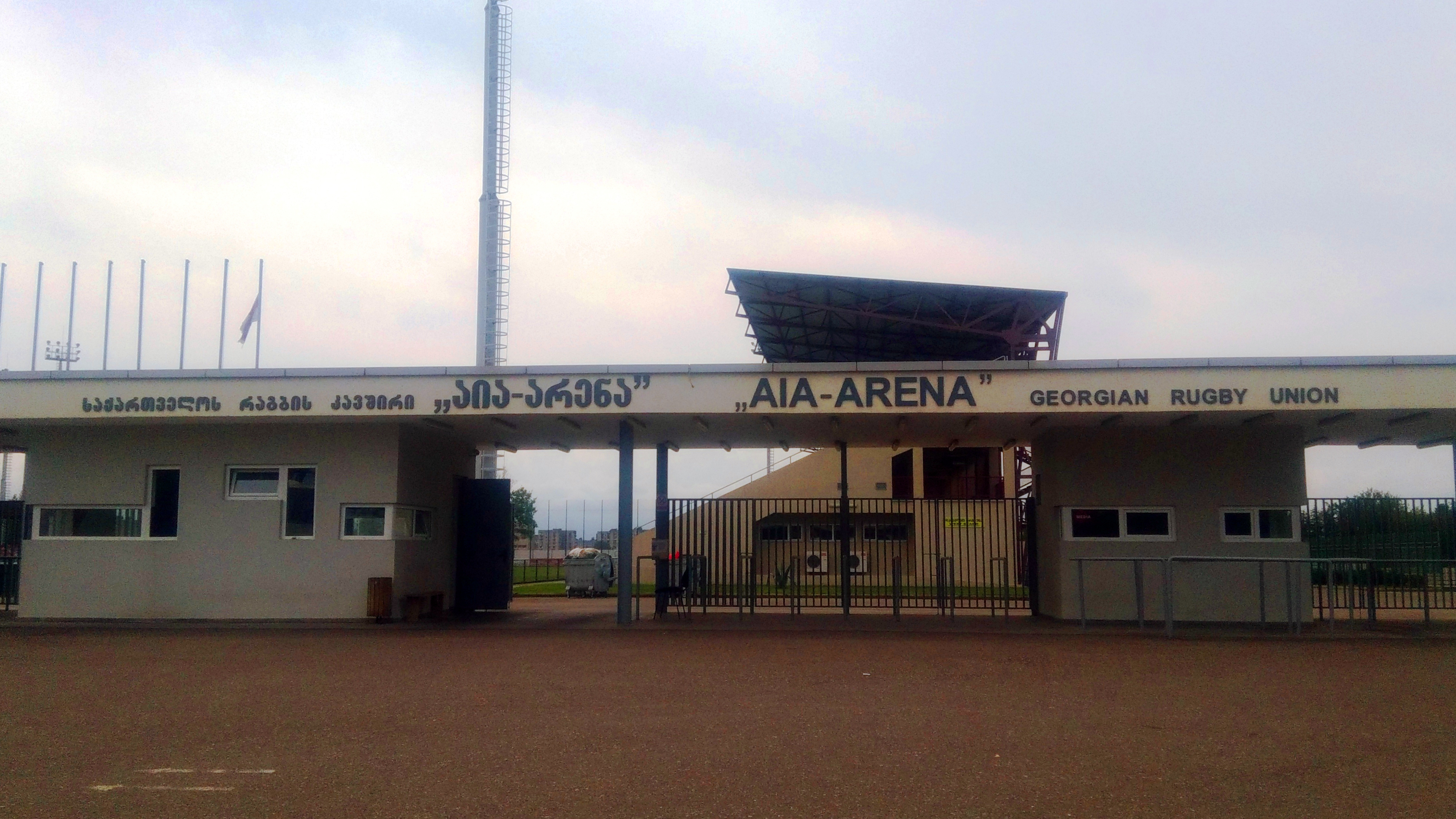 აია ქუთაისის სტადიონი